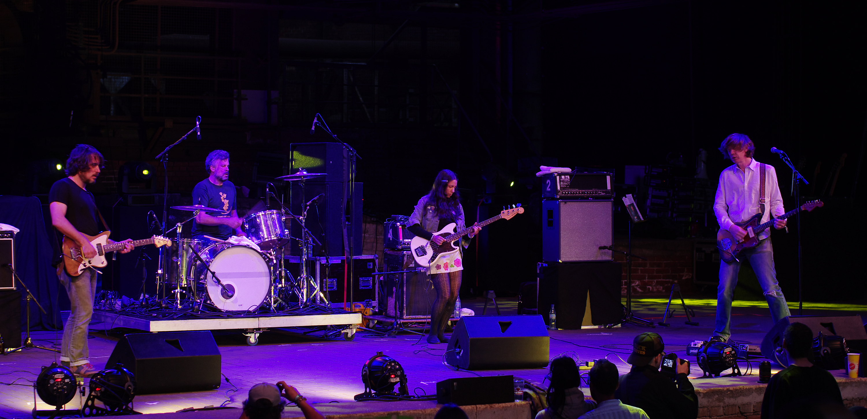 Chelsea Light Moving beim Traumzeit-Festival 2013 in Duisburg. Besetzung: Samara Lubelski (bass), John Moloney (dr), Thurston Moore (voc, git), Keith Wood (git)